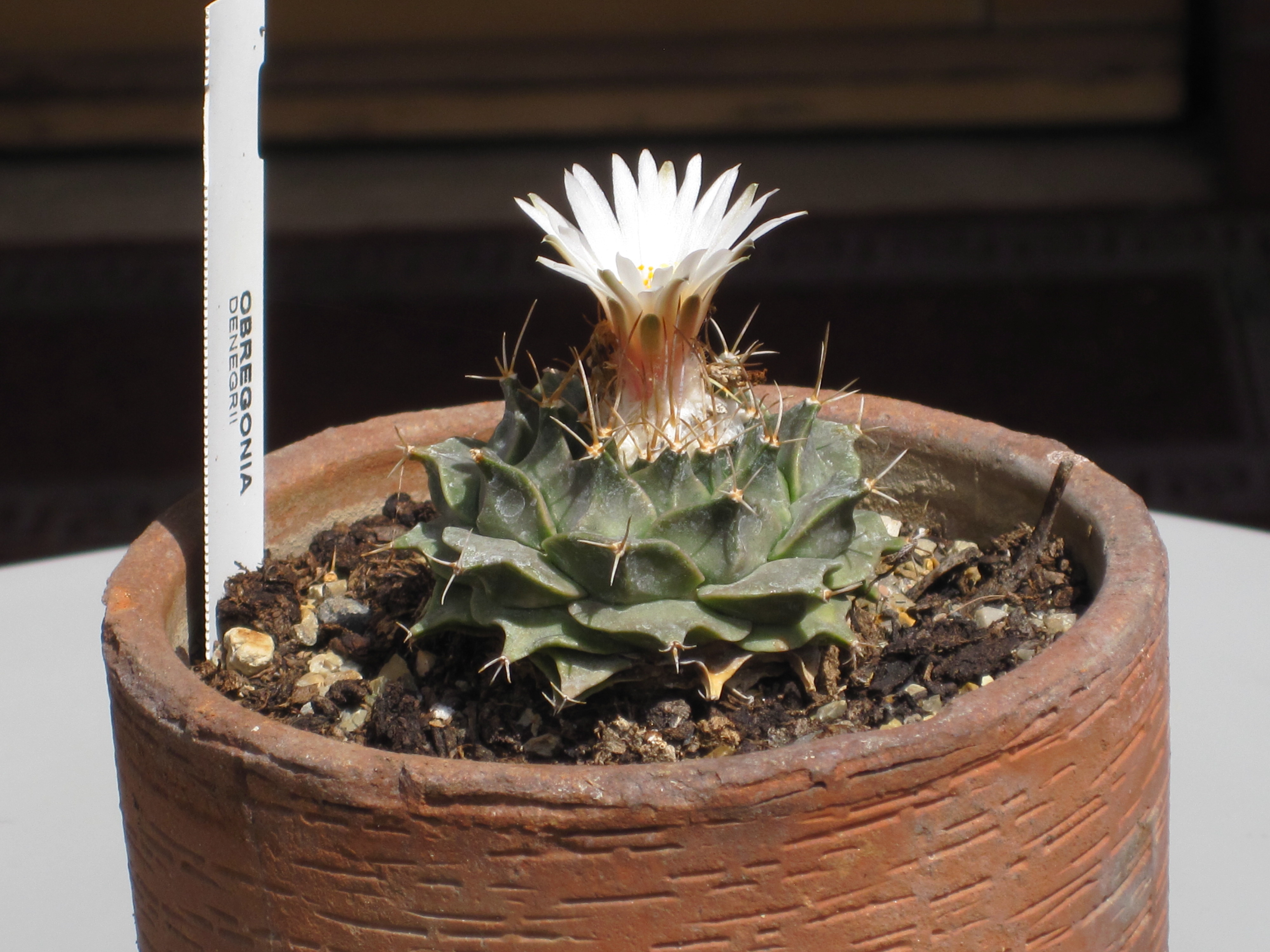 Obregonia denigrii fiorita